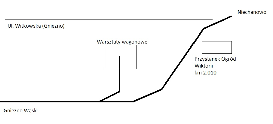 Szkic przystanku osobowego Ogród Wiktorii, październik 1949 rok